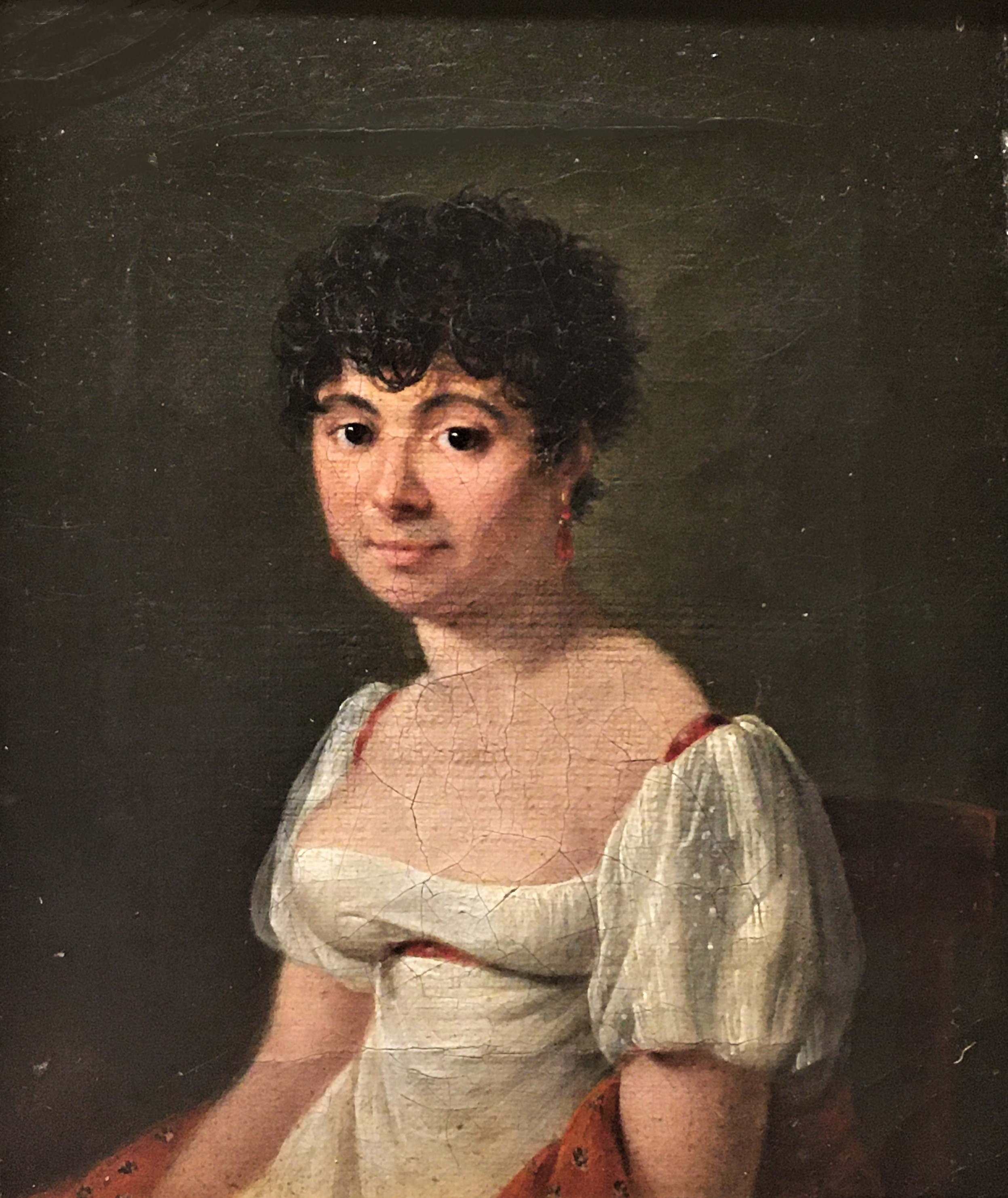 Portrait of Madame Lebleu by François SABLET in the Alexandre Vassiliev Foundation